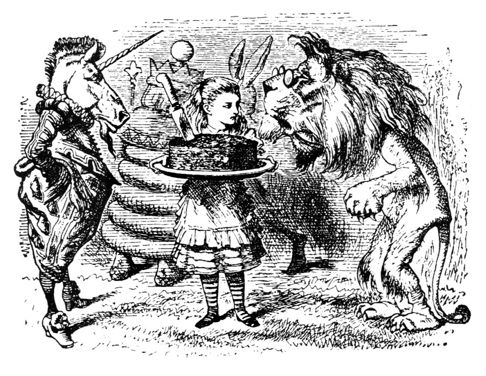 гравюра Джона Тенниела